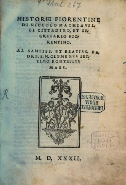 Niccolò Machiavelli, Historie Fiorentine (1532) title page